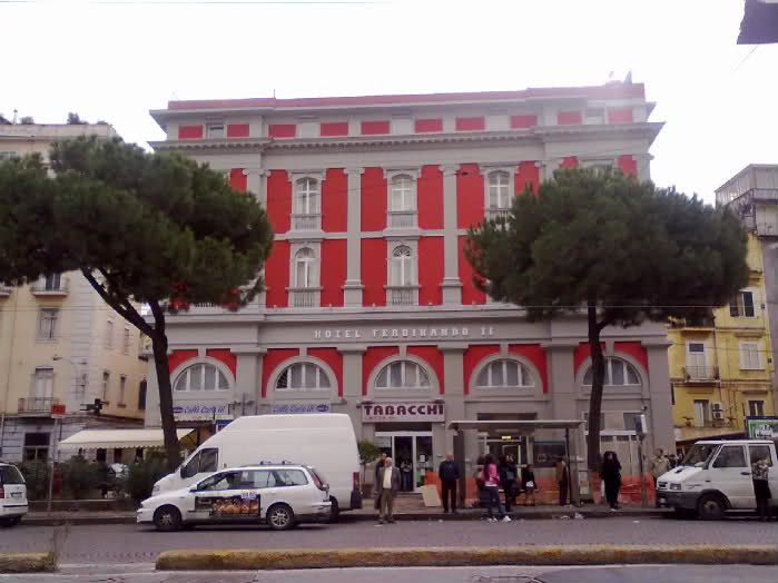 Facciata della vecchia stazione terminale della ferrovia Alifana, in piazza Carlo III. Oggi ospita un albergo.